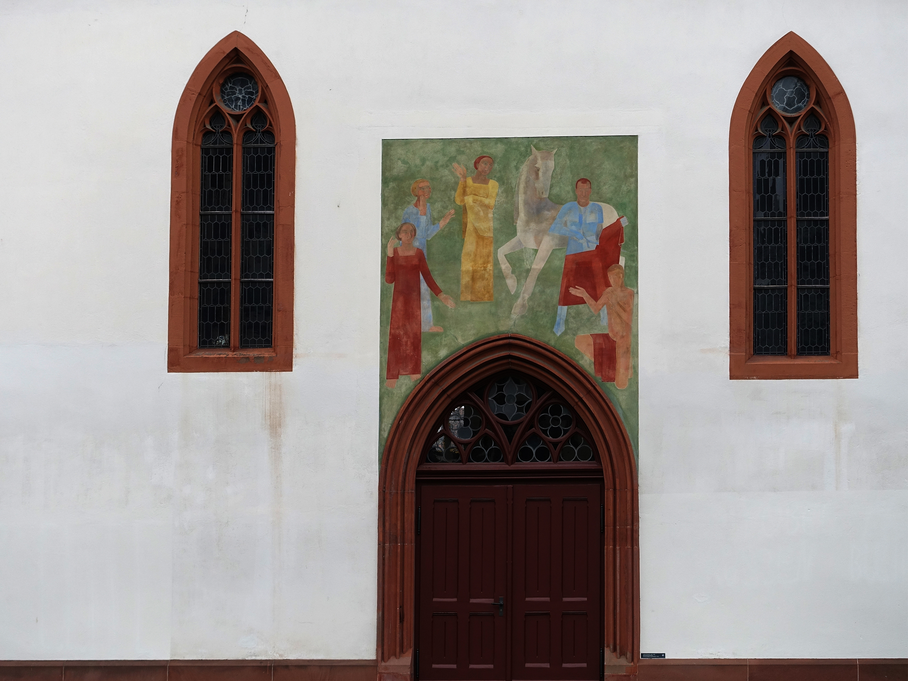 Wandbild über dem Südportal der Martinskirche in Basel, von 1922 zeigt der Heilige Martin.